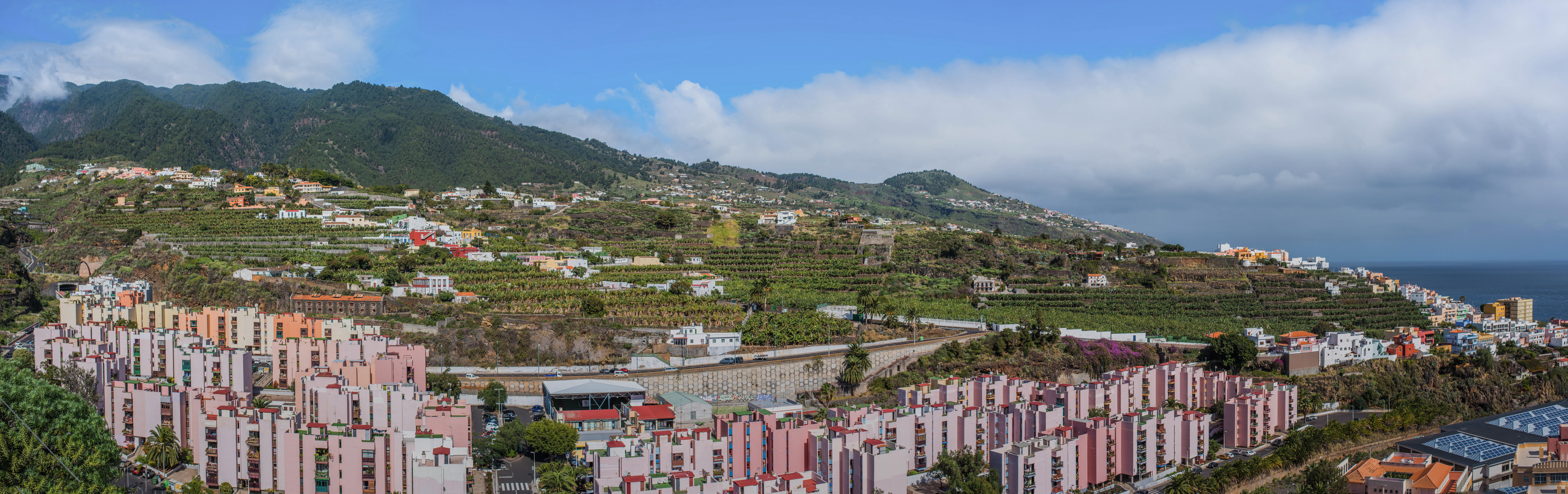 Santa Cruz, La Palma